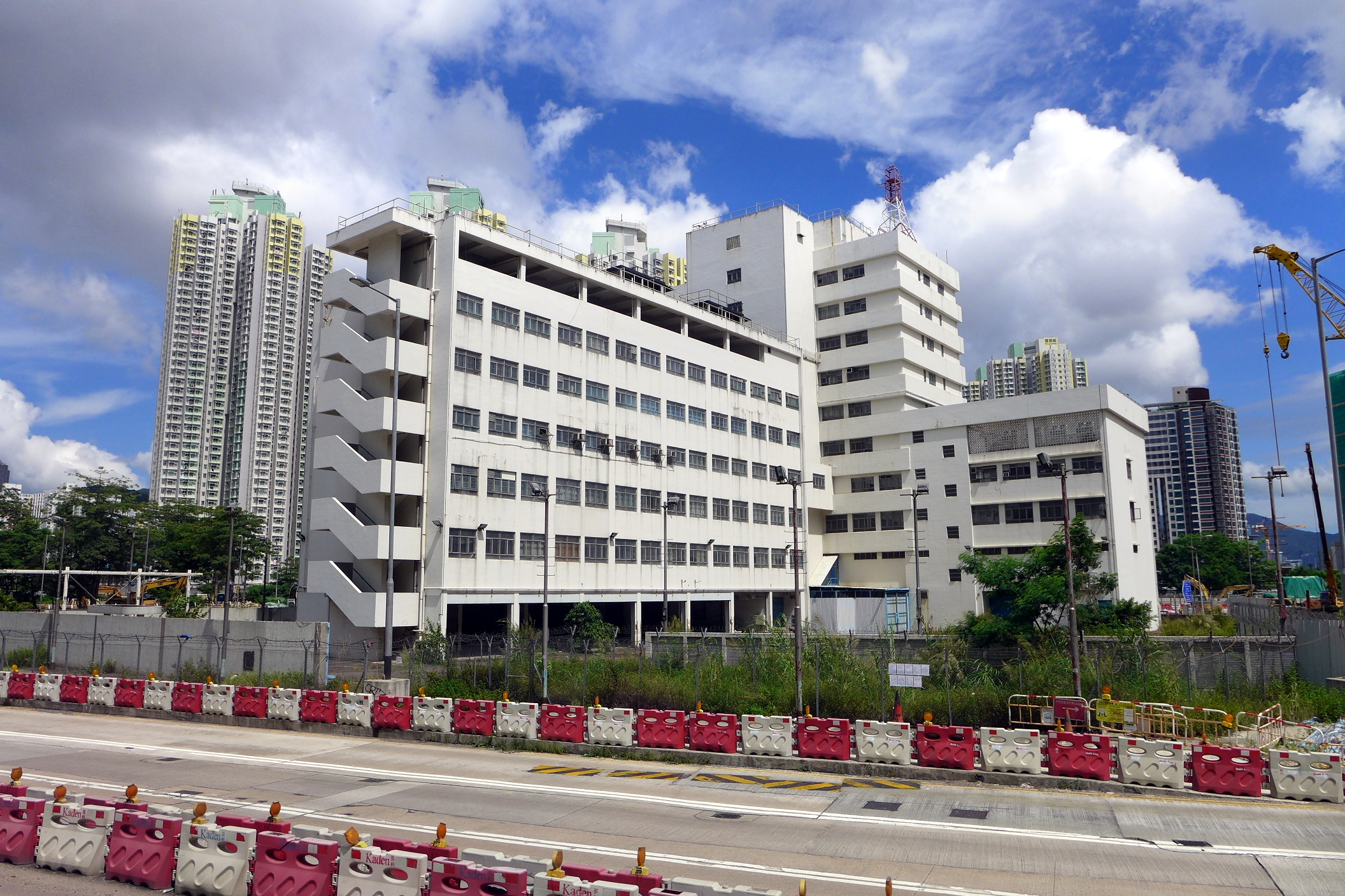 Kai Tak Action Base